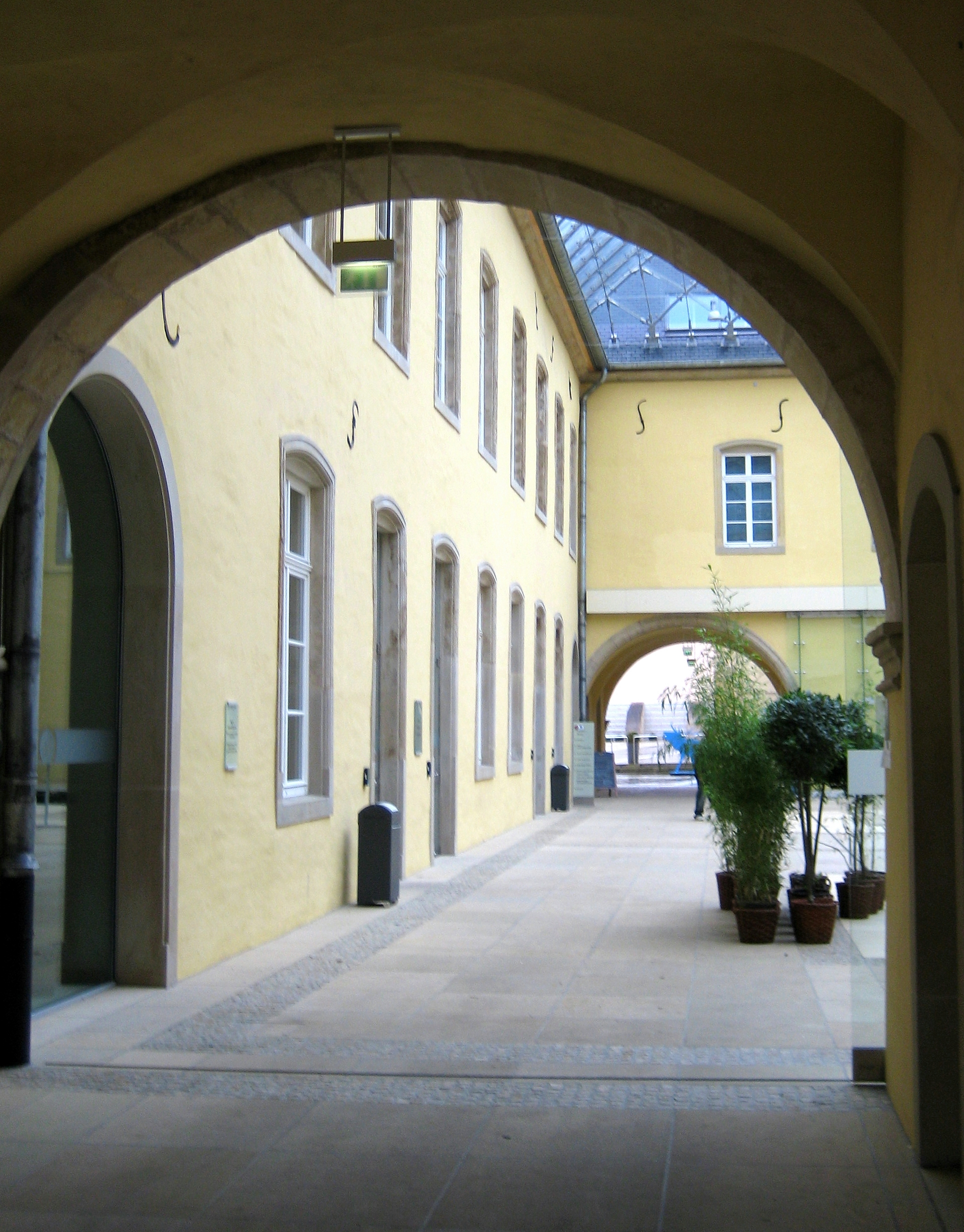 Centre Culturel de Rencontre Abbaye de Neumünster - Agora Marcel Jullian